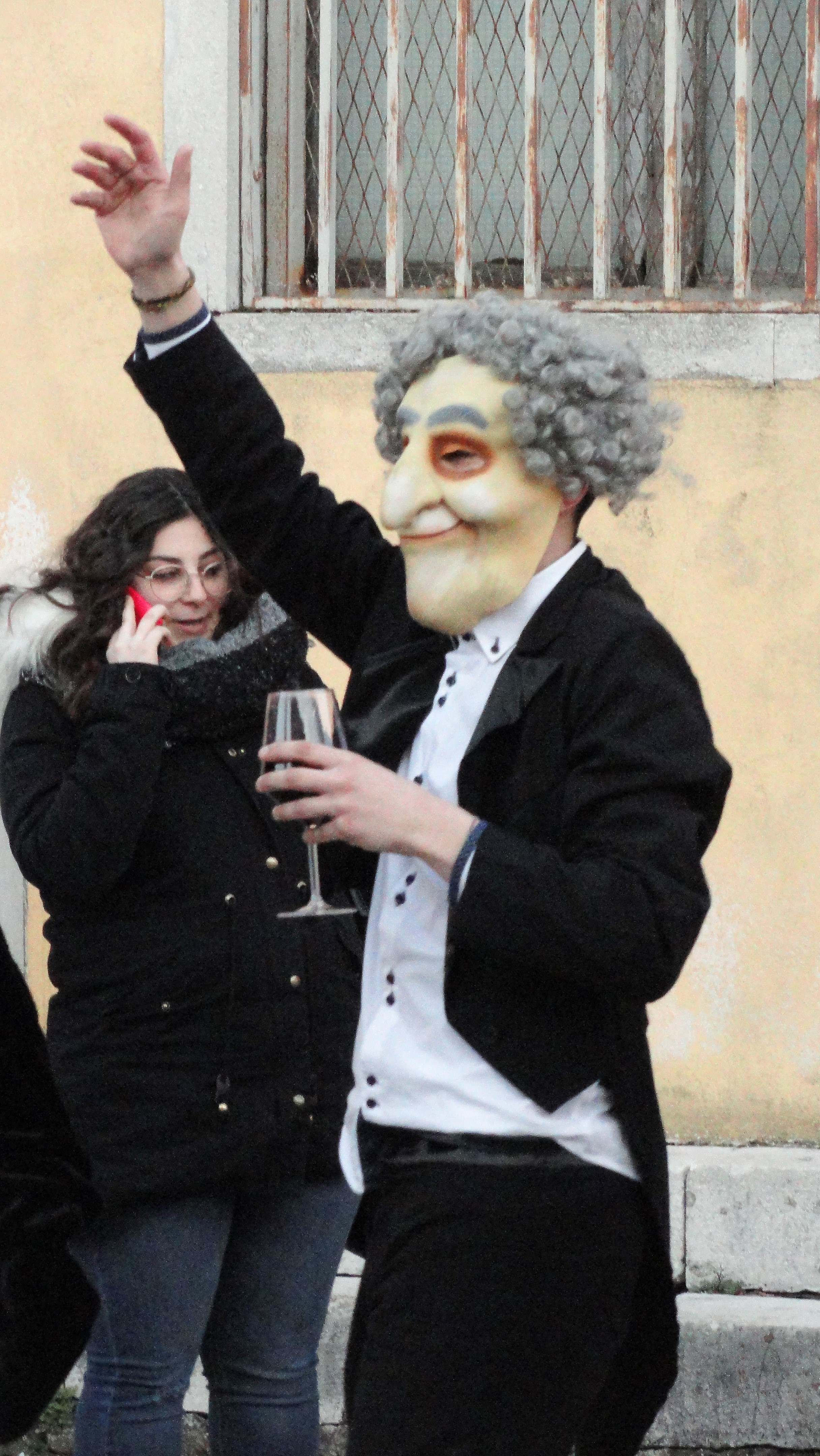 In alto i calici. This photo has been taken in the country: Italy